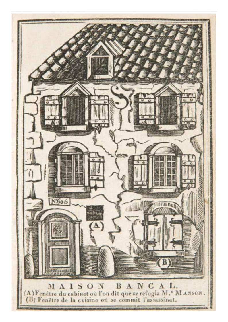 Maison Bancal, illustration hors texte pour Histoire du célèbre procès relatif à l’assassinat de M. Fualdès, Cour d’assises du Tarn, gravure sur bois, Lille, Castiaux, tome I, 1818, collection bibliothèque de la Société des lettres de l’Aveyron.